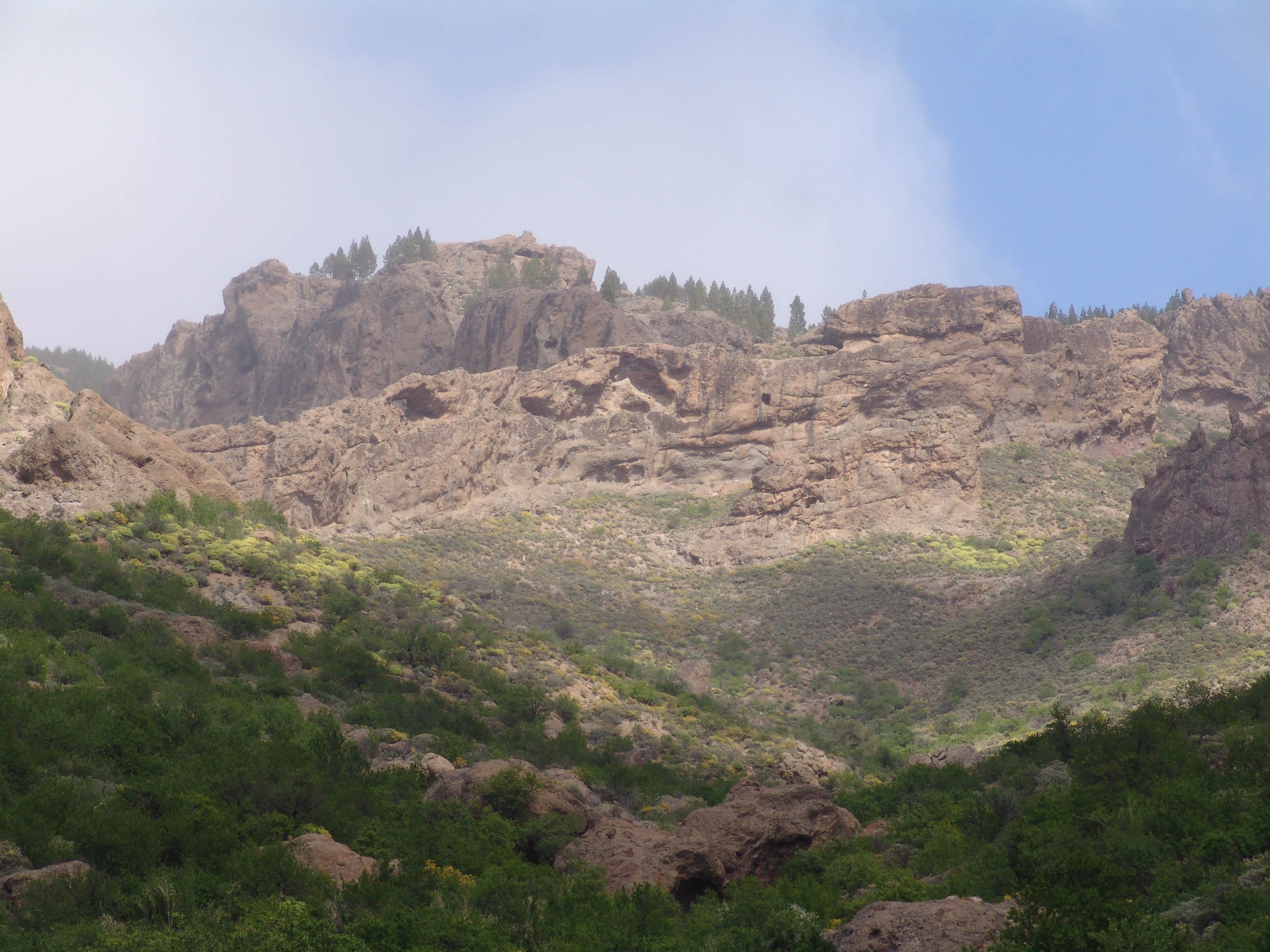 Bergwelt Gran Canarias